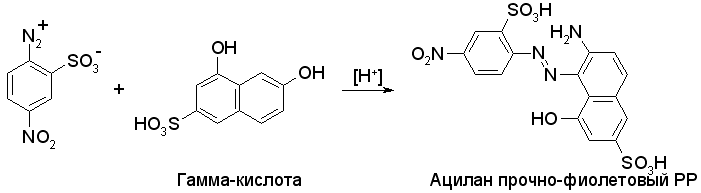 Схема получения кислотного моноазокрасителя Ацилана прочно-фиолетового РР